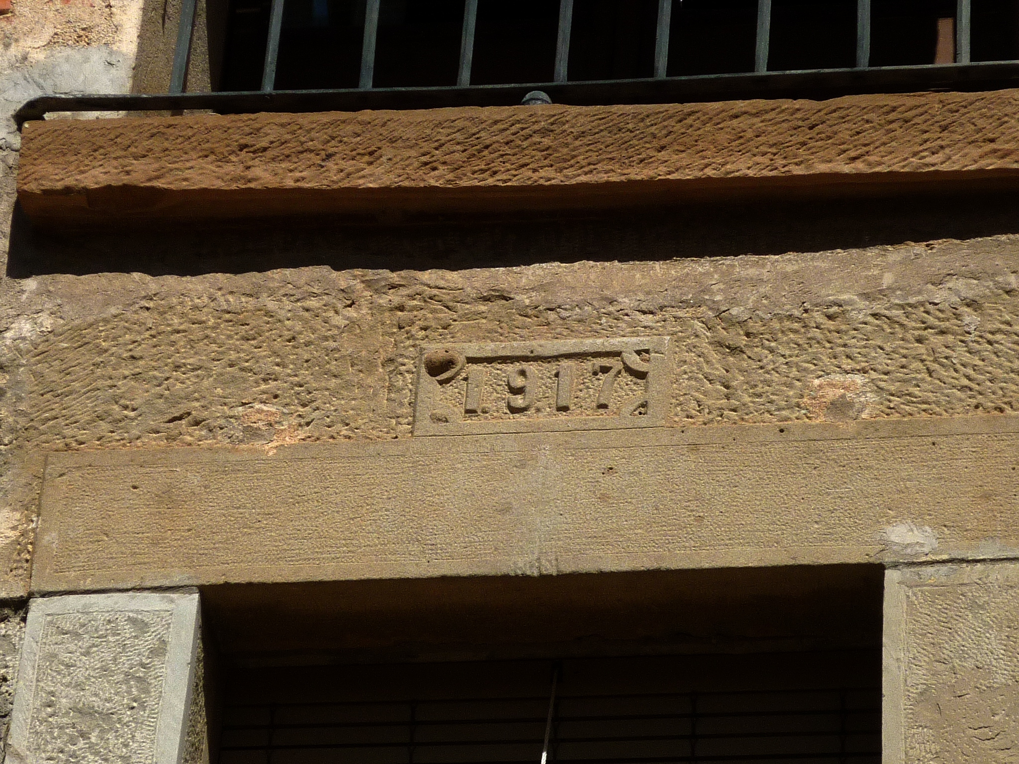 Les Feixes (Torà): data a la llinda del bancó